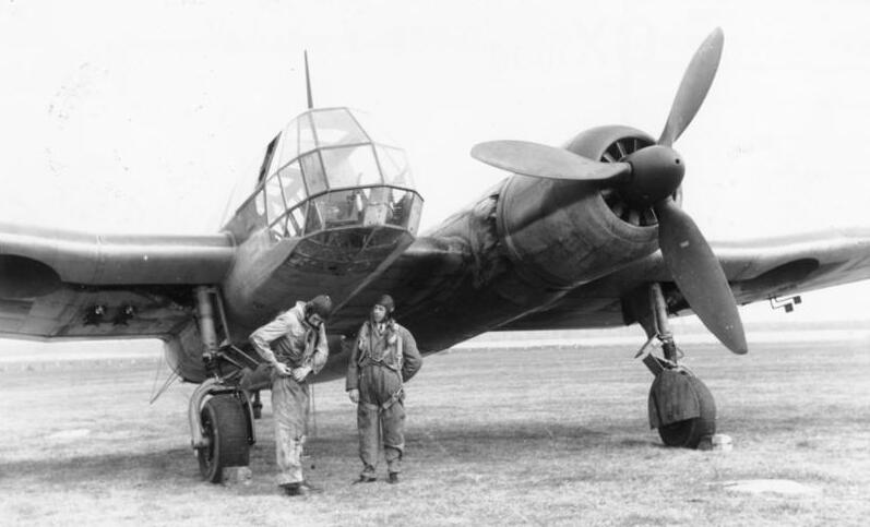 Blohm & Voss - BV 141 kurz vor dem Start Foto : P.K. Luftwaffe 2722-42